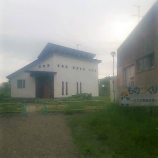 釧路高専内にある北方型実験住宅